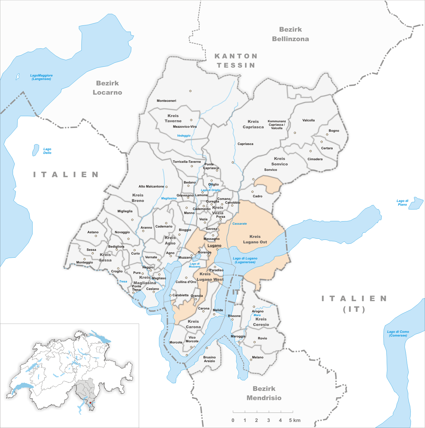 Municipality Lugano